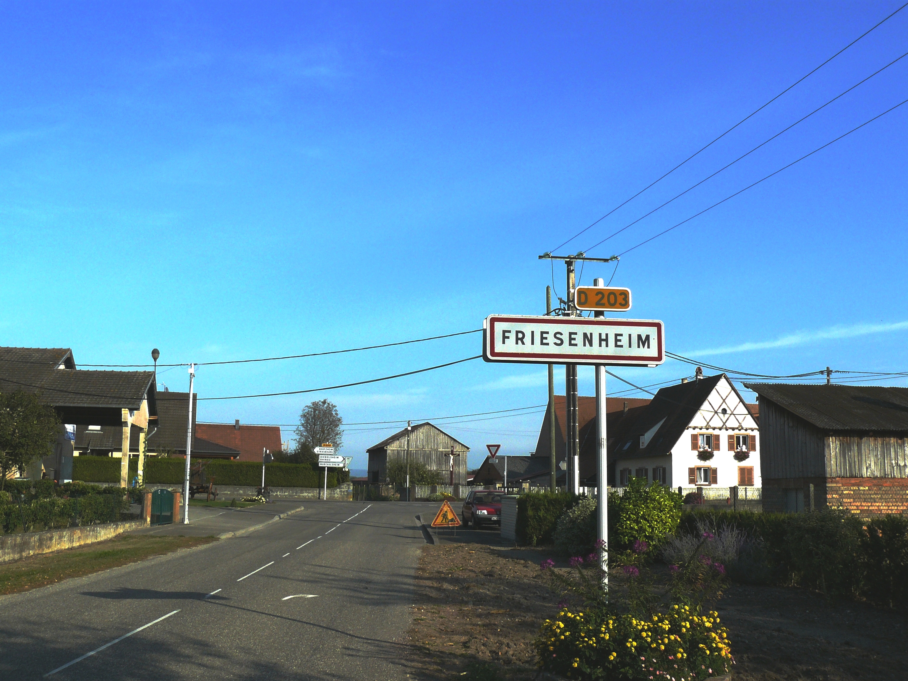 Entrée du village de Friesenheim par la D 203